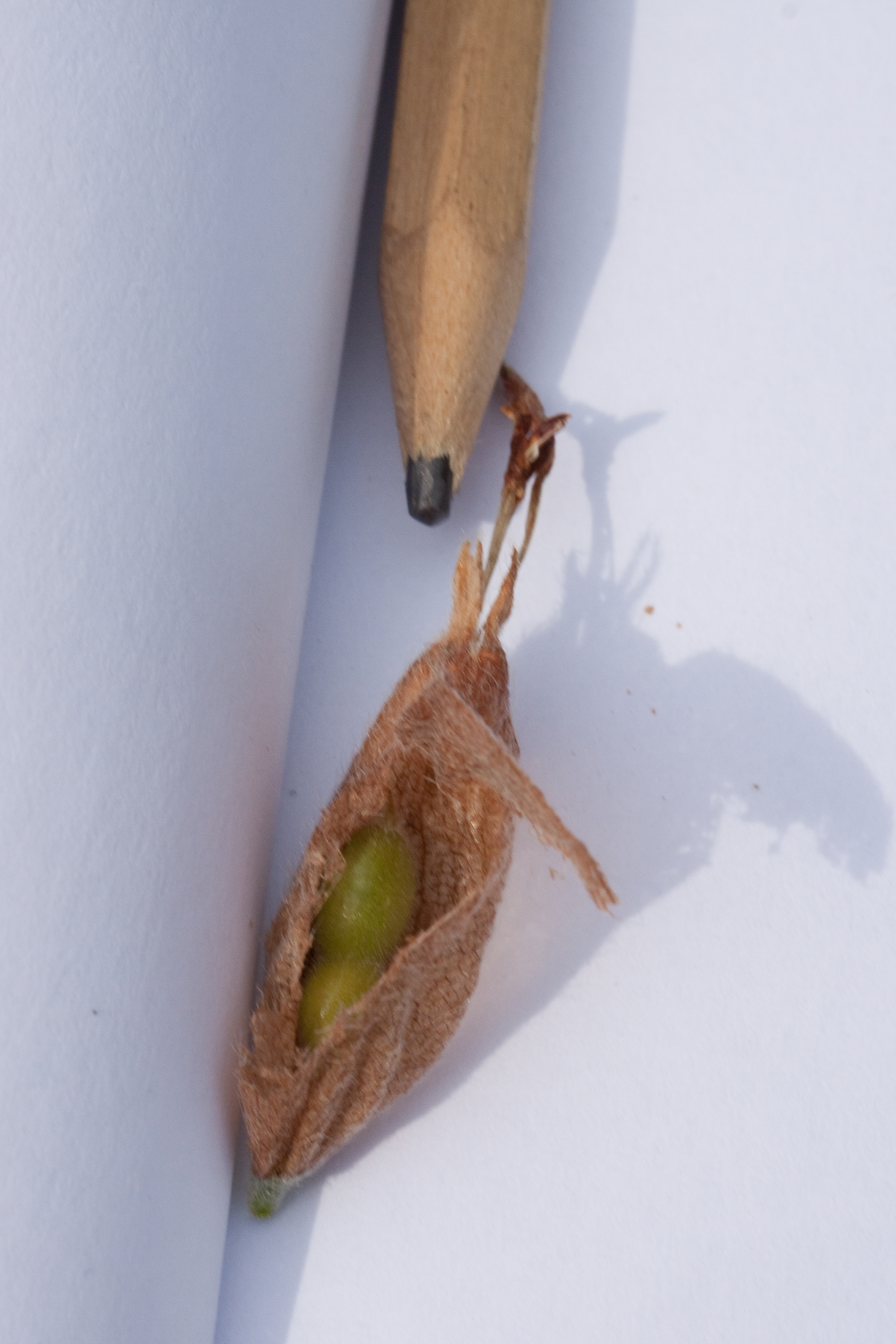 Tripodion tetraphyllum - Gousse - Jardin des Plantes - Paris - France